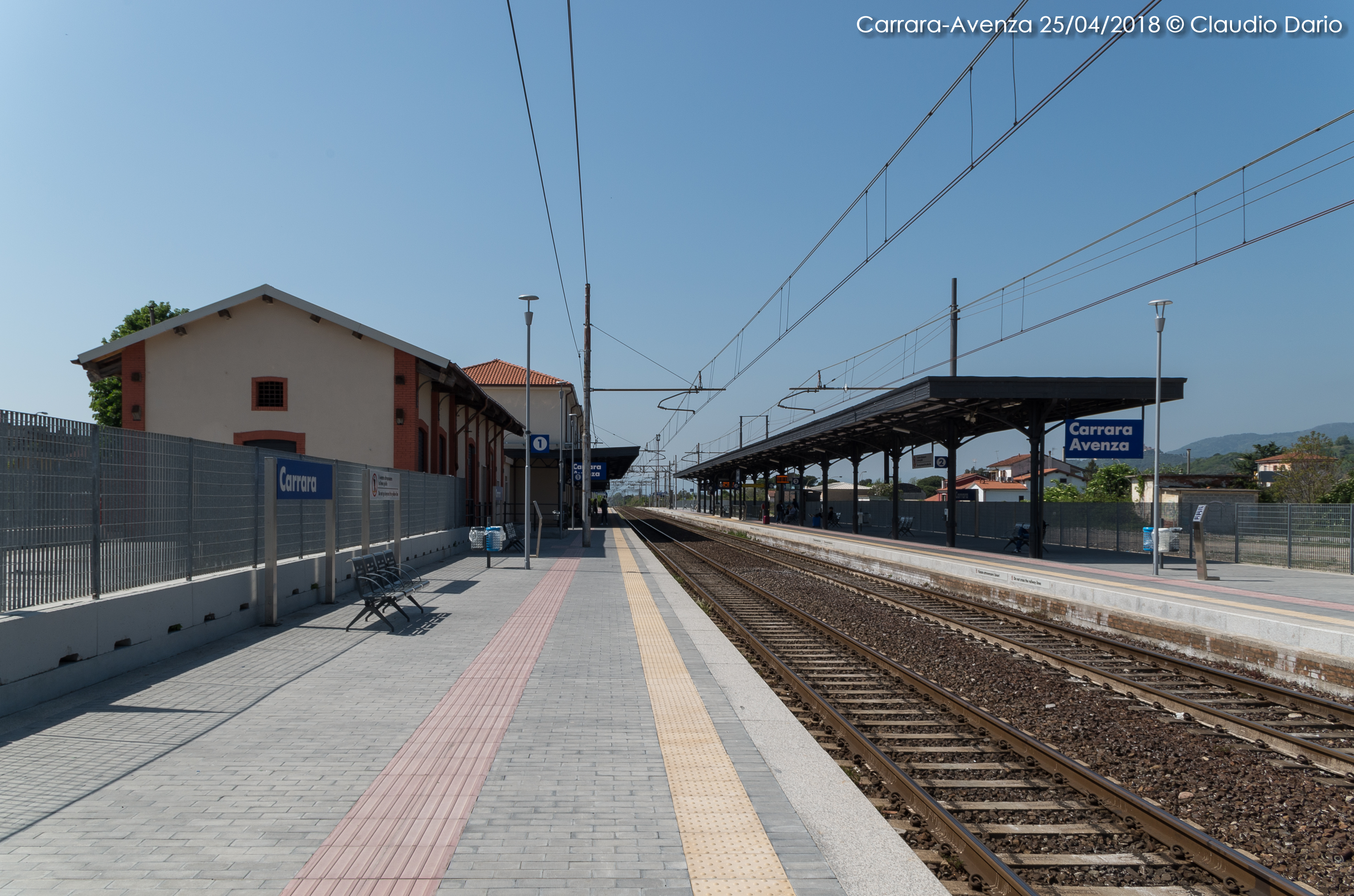 Veduta della stazione ferroviaria di Carrara-Avenza dopo i lavori di riqualificazione del 2017/2018.